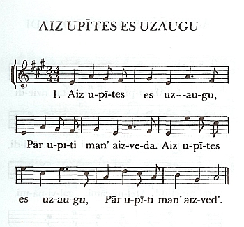 „Aiz upītes es uzaugu” sākuma notis.